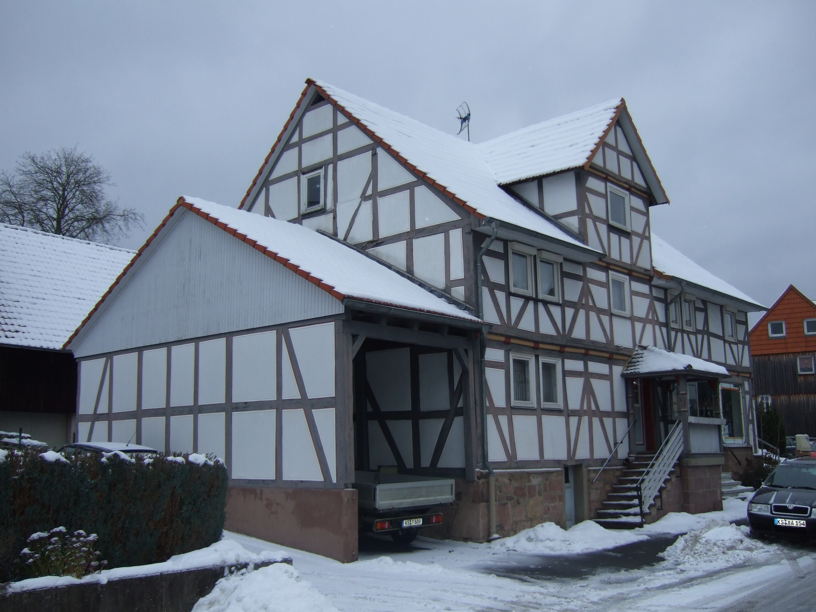 Schützenhaus Söhrewald